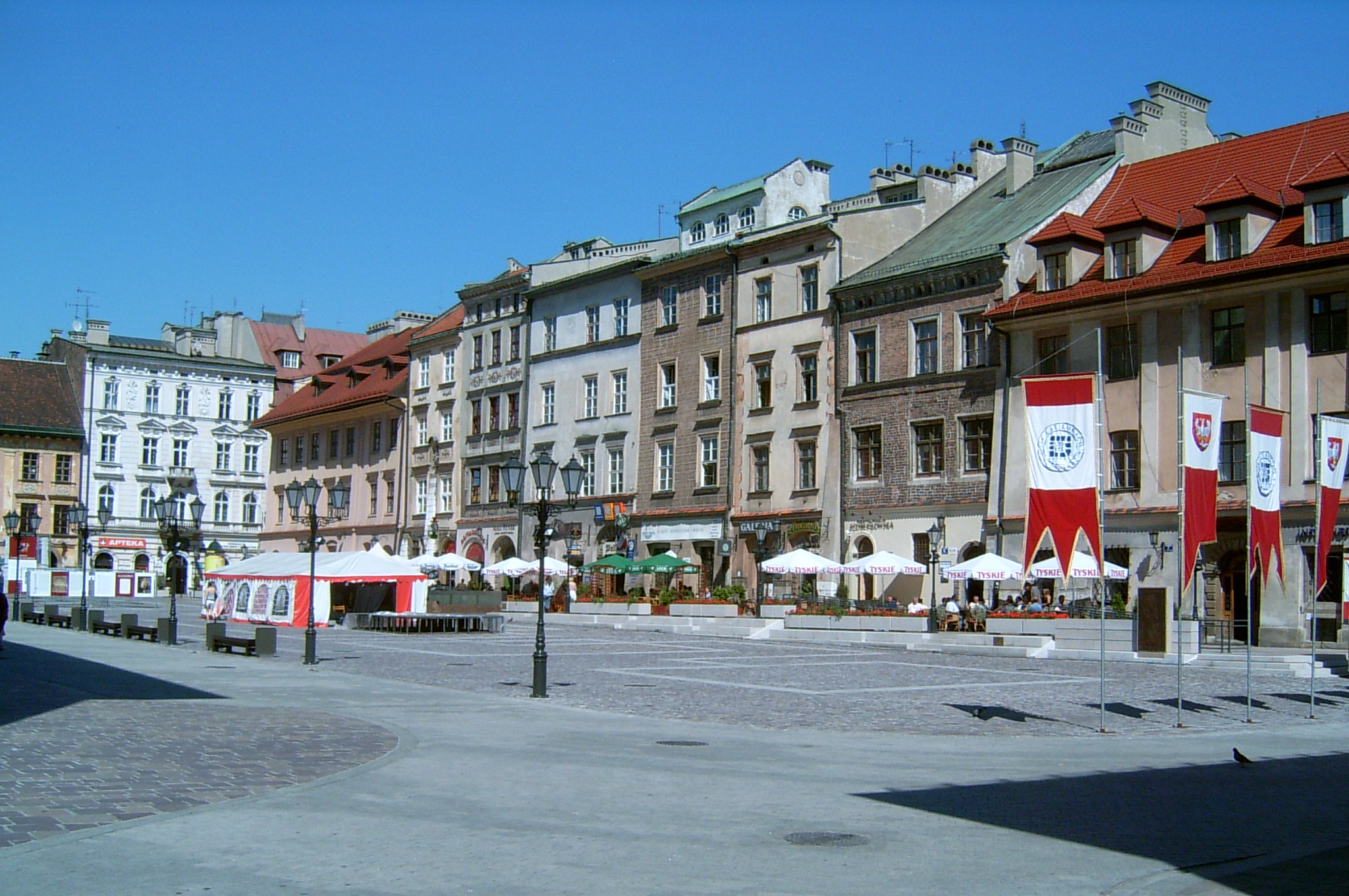 Kraków, Poland